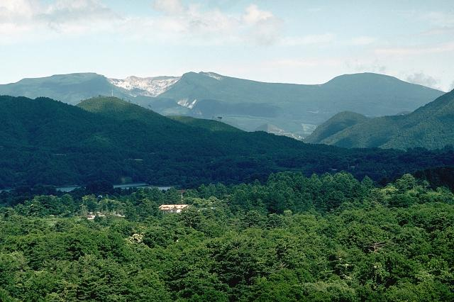 Adatara volcanic complex